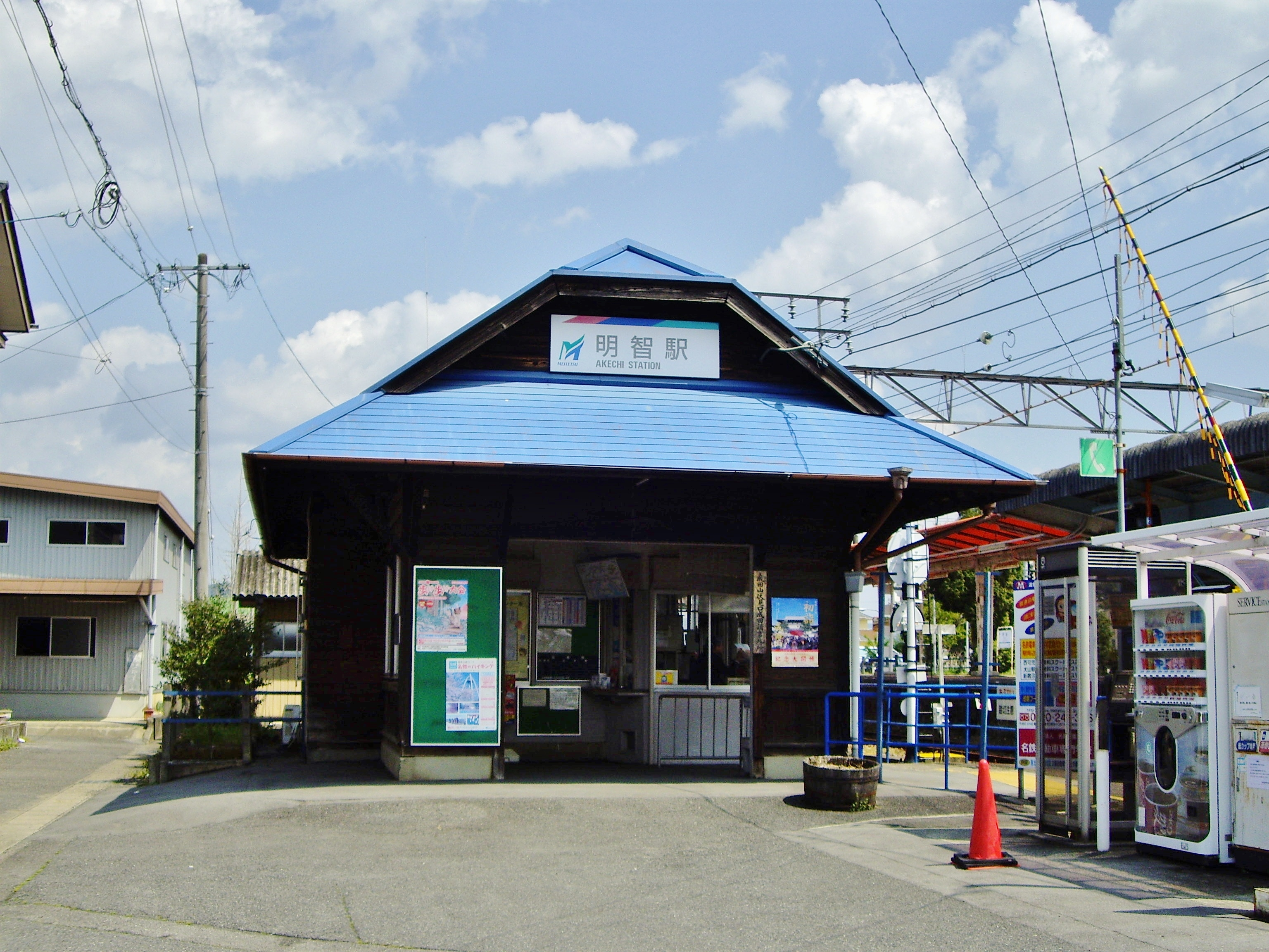 Akechi Station (Meitetsu Hiromi Line)